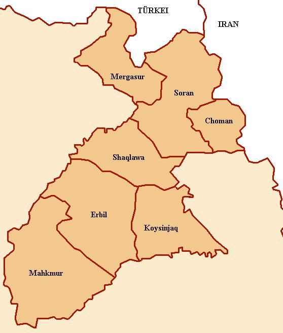 die provinz erbil mit ihren landkreisen